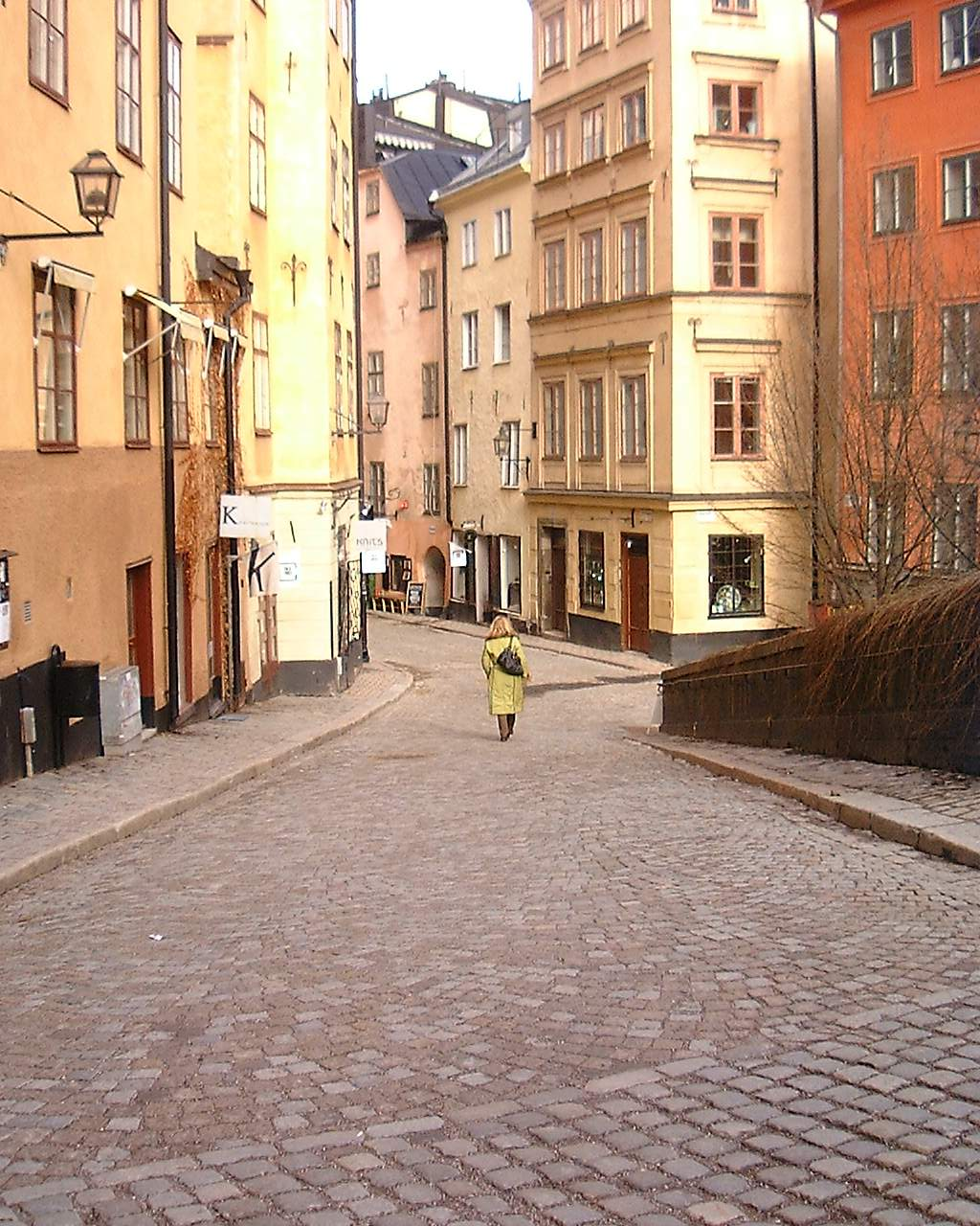 Köpmanbrinken, Gamla stan, Stockholm.